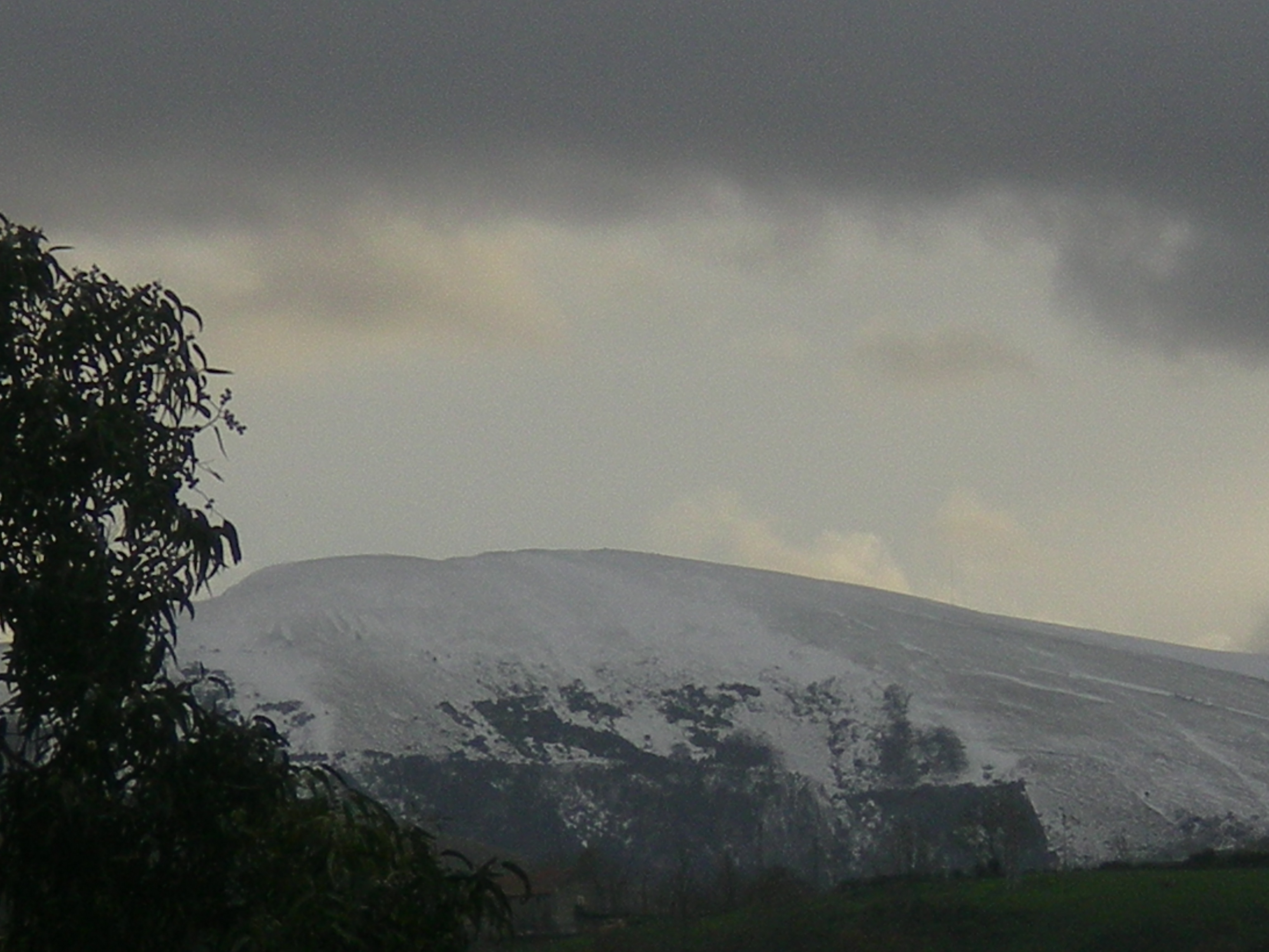 Ganekogorta mendia Bilbotik ikusia.